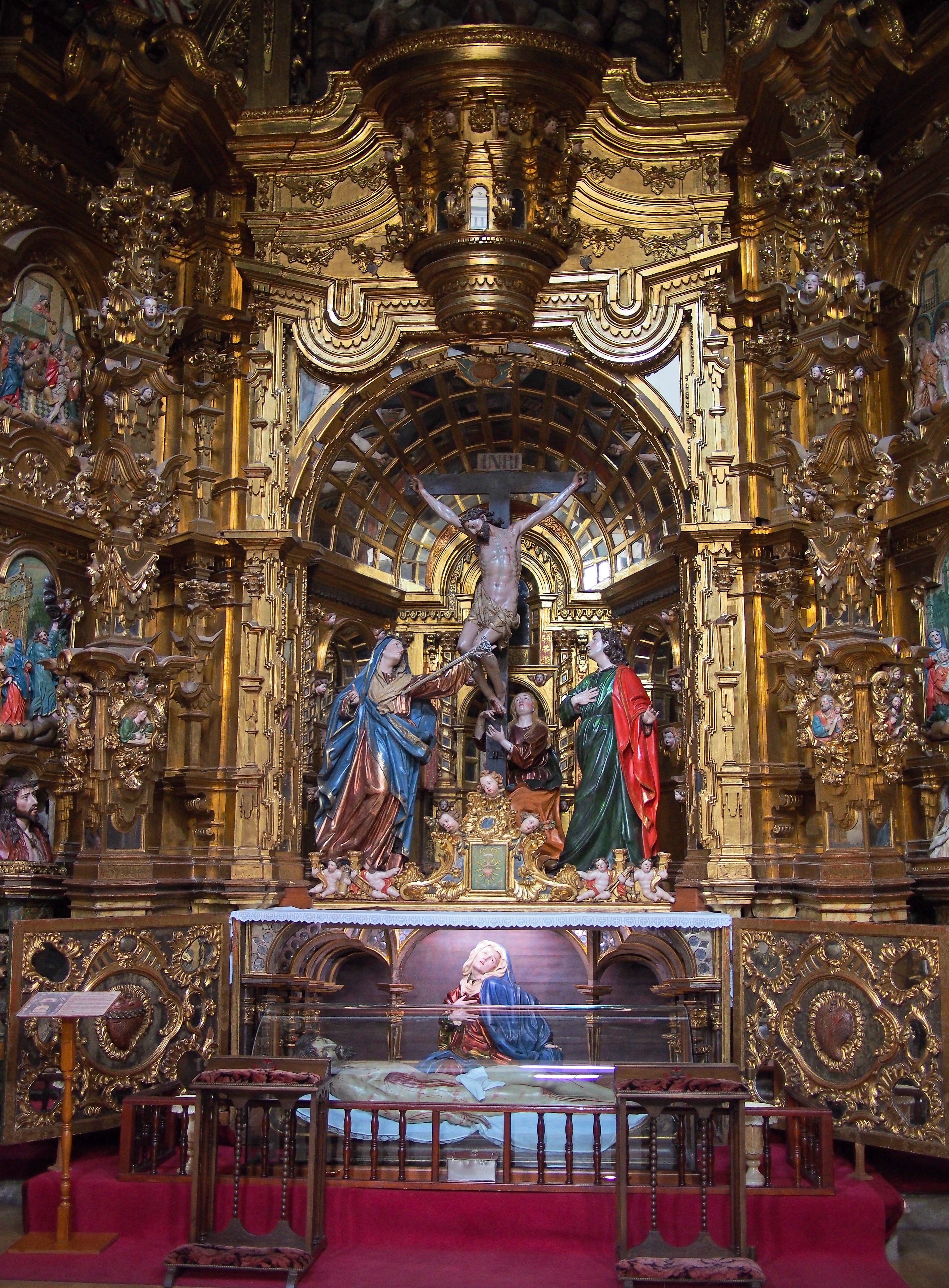 Retablo de la Buena Muerte. Iglesia de San Miguel y San Julián, Valladolid. Cristo yacente de Gregorio Fernández, detrás, Virgen de la Amargura de Pedro de Sierra. Calvario de Pedro de Sierra.